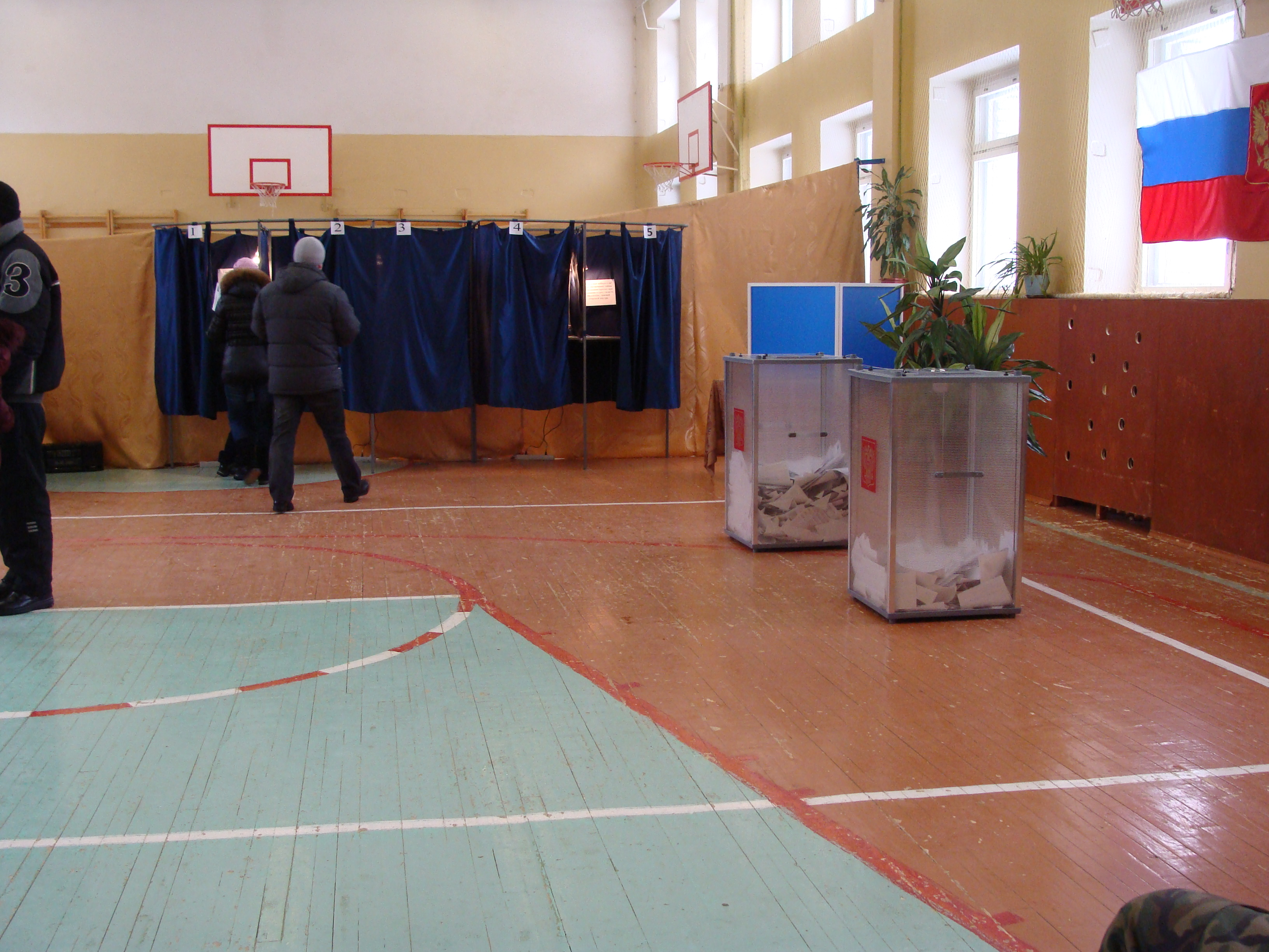 Выборы президента 2012, Коряжма, школа N 3